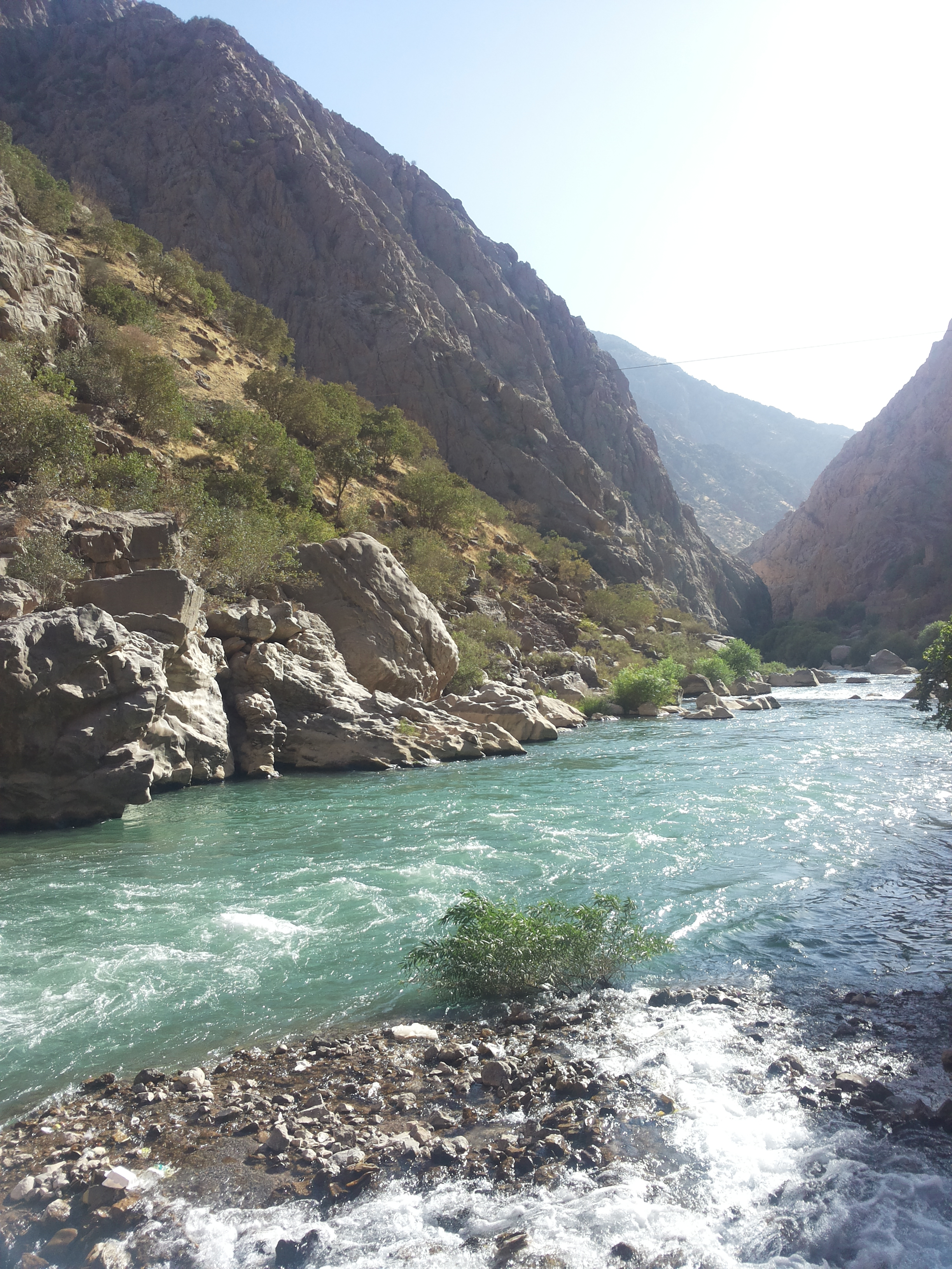 کوردی: گەشتنەوەی ئاوەکەی کانی بڵ و سیروان بە یەکتر Intersection of Kani Bil and Sirwan